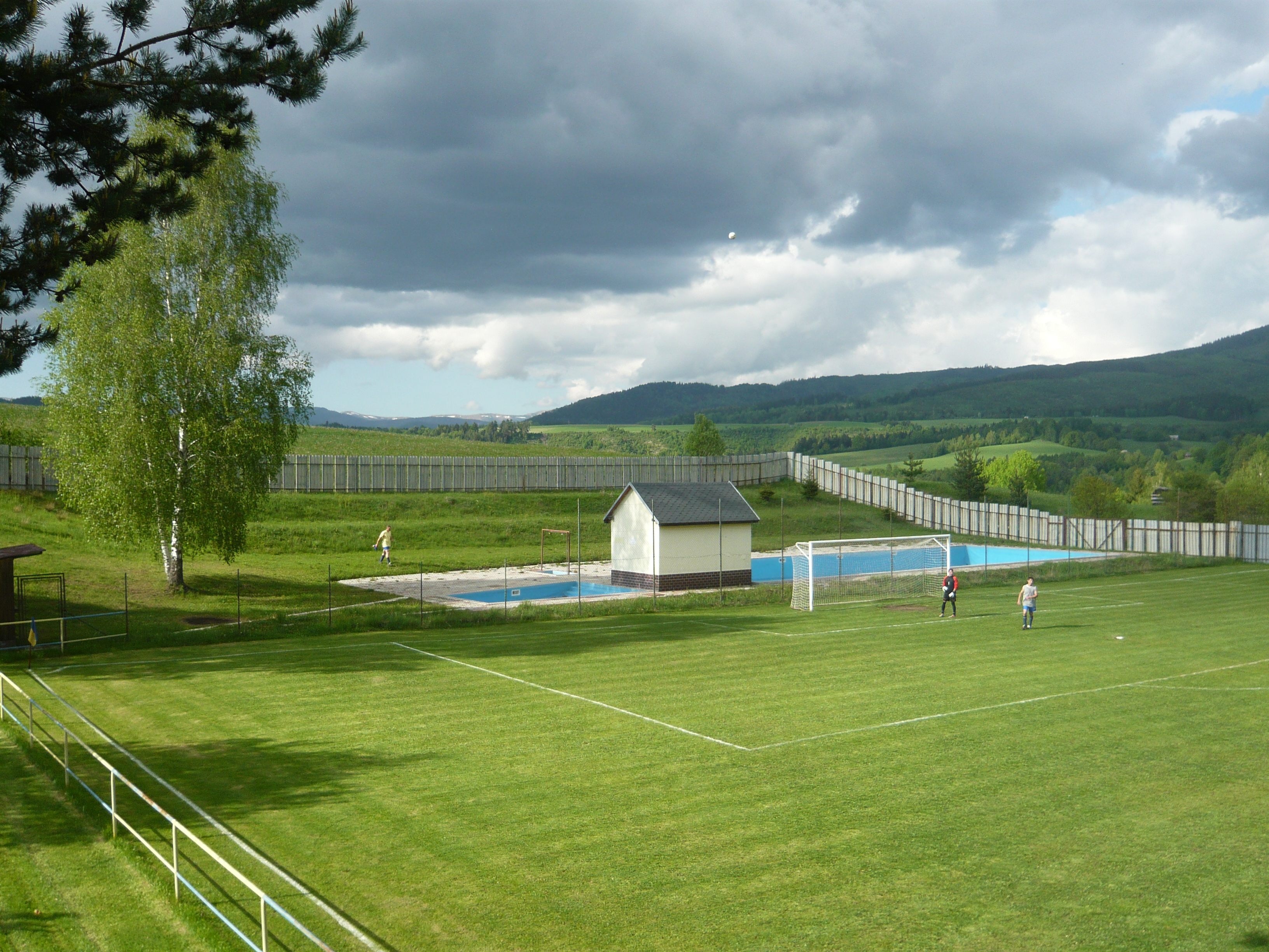 Kúpalisko Strelníky v areály futbalového ihriska